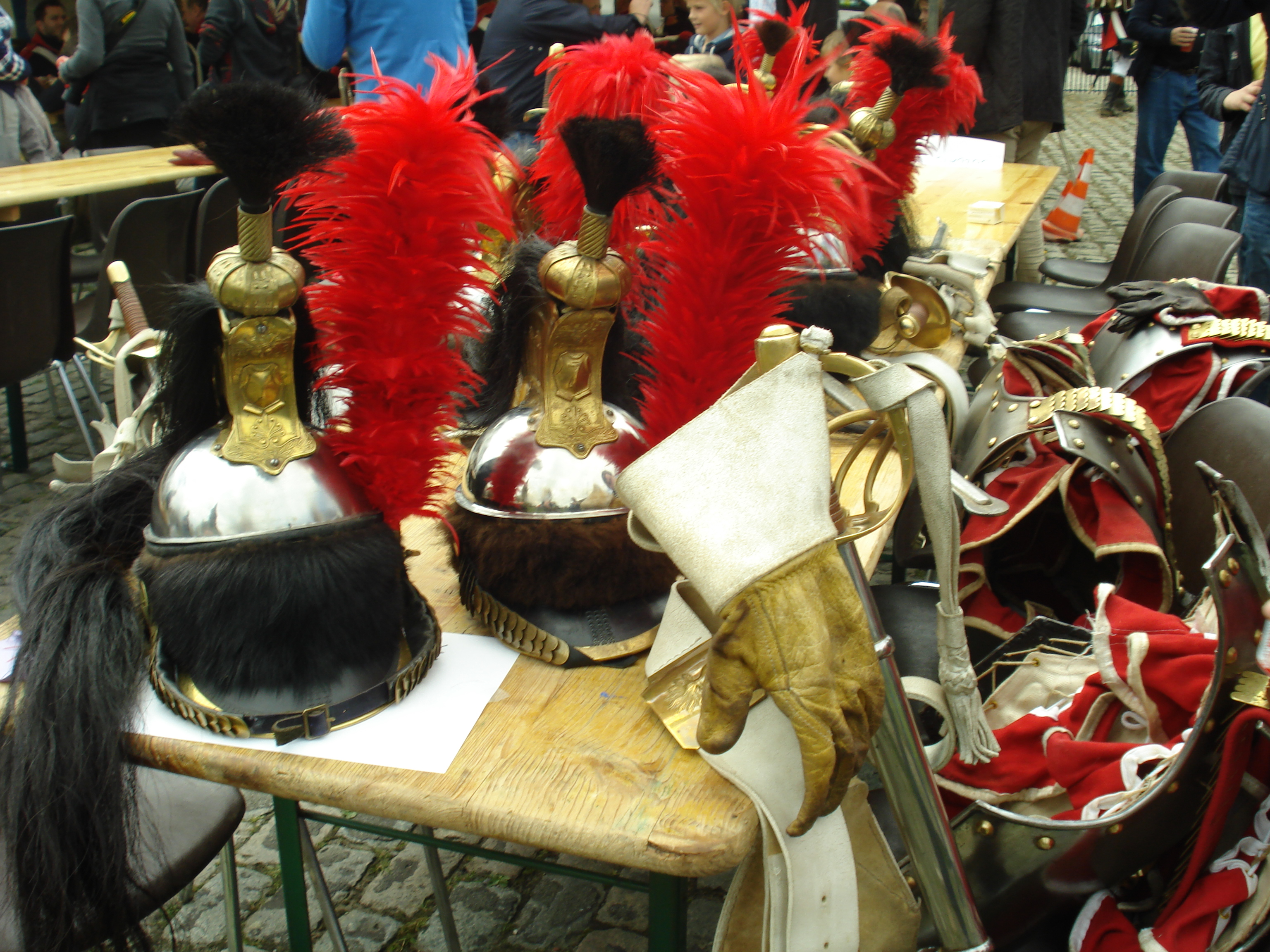 Waterloo - Juin 2012